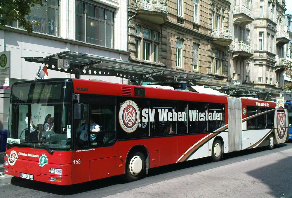 Bus mit SVWW-Logo